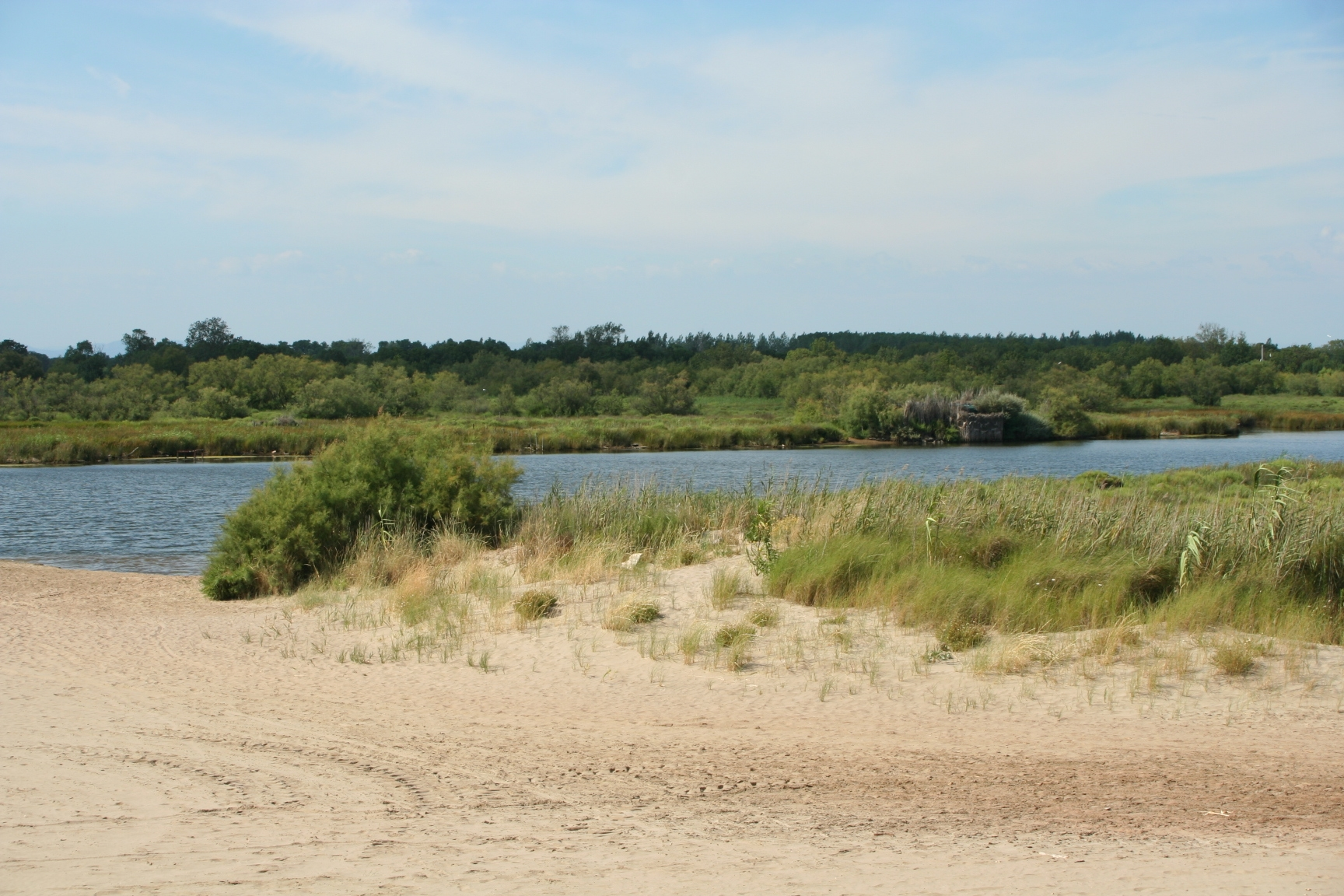 L'étang du Clôt de Vias, situé en arrière de la plage de la Tamarissière, à Agde (Hérault, France)